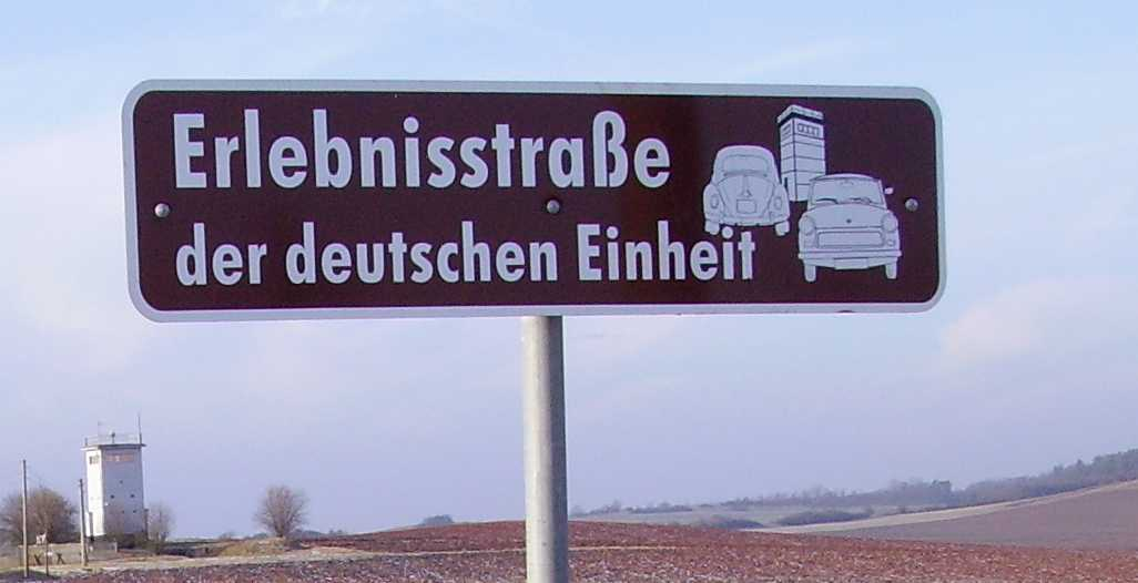 Touristische Kenntlichmachung der Erlebnisstraße der Deutschen Einheit, hier an der Verbindungsstraße zwischen Gompertshausen/Thüringen und Alsleben/Bayern. Im Hintergrund das Grenzturm- und Führungsbunkermuseum bei Gompertshausen.